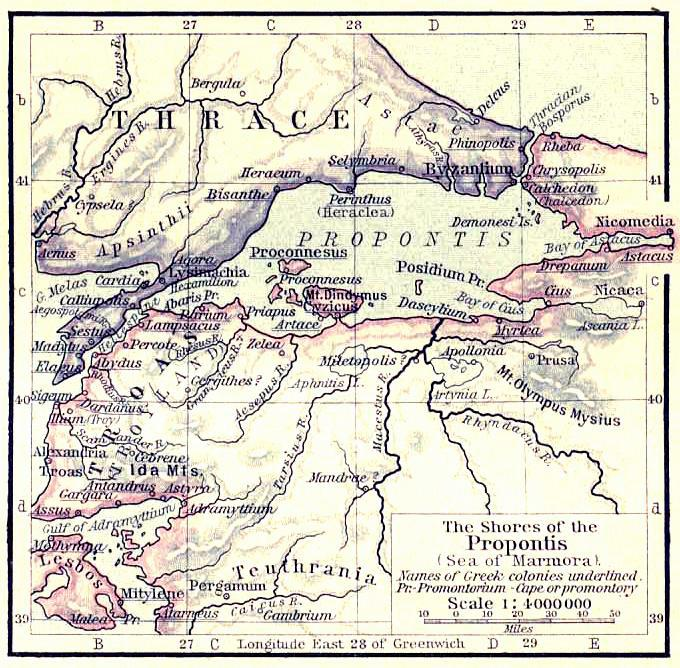 Karte der Propontis in der Antike, von William Robert Shepherd, 1923